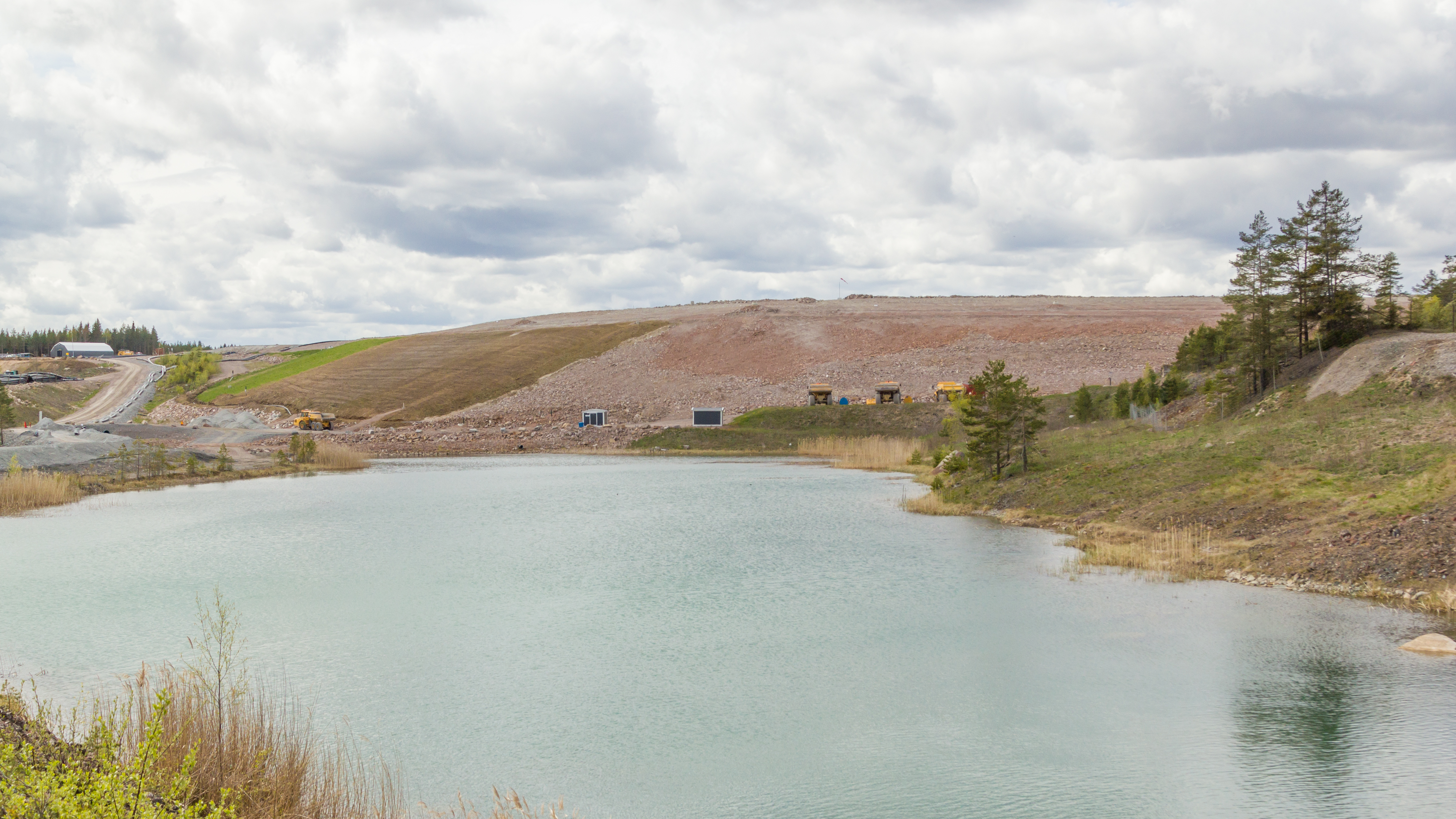 Valbäcksdamm och dammvallen till Ryllshyttsjön (Ryllshyttedammen), (före detta Kompanigruvan), utanför Garpenberg, Dalarnas län, Sverige.